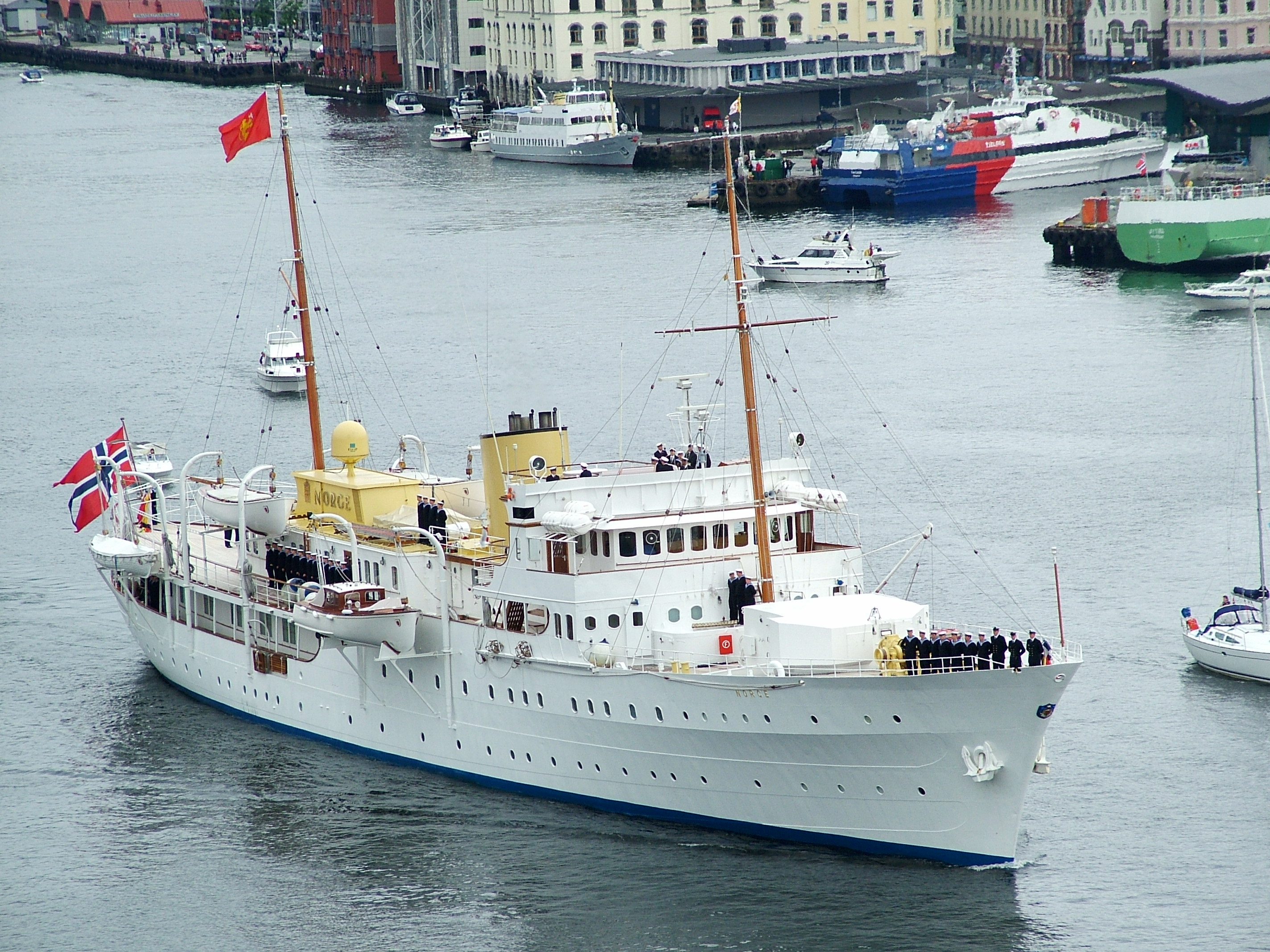 Kongeskipet Norge